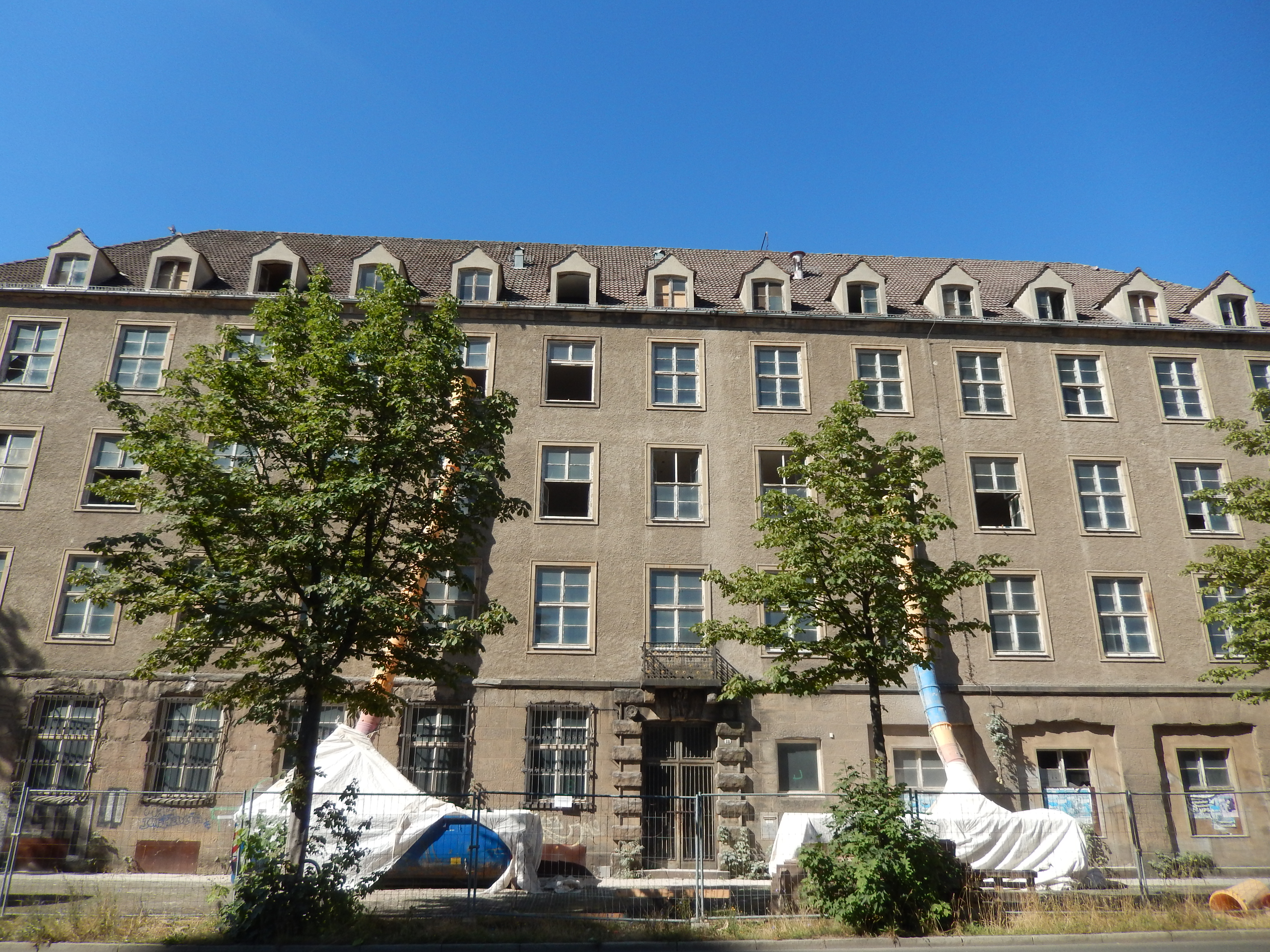 Dresden-Seevorstadt: Siemenshaus Sidonienstraße 18.